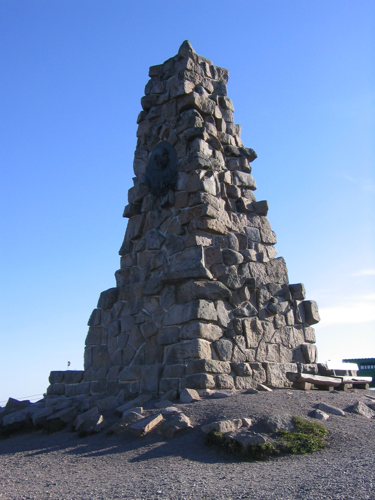 Bismarckdenkmal, Seebuck/Feldberg, Schwarzwald